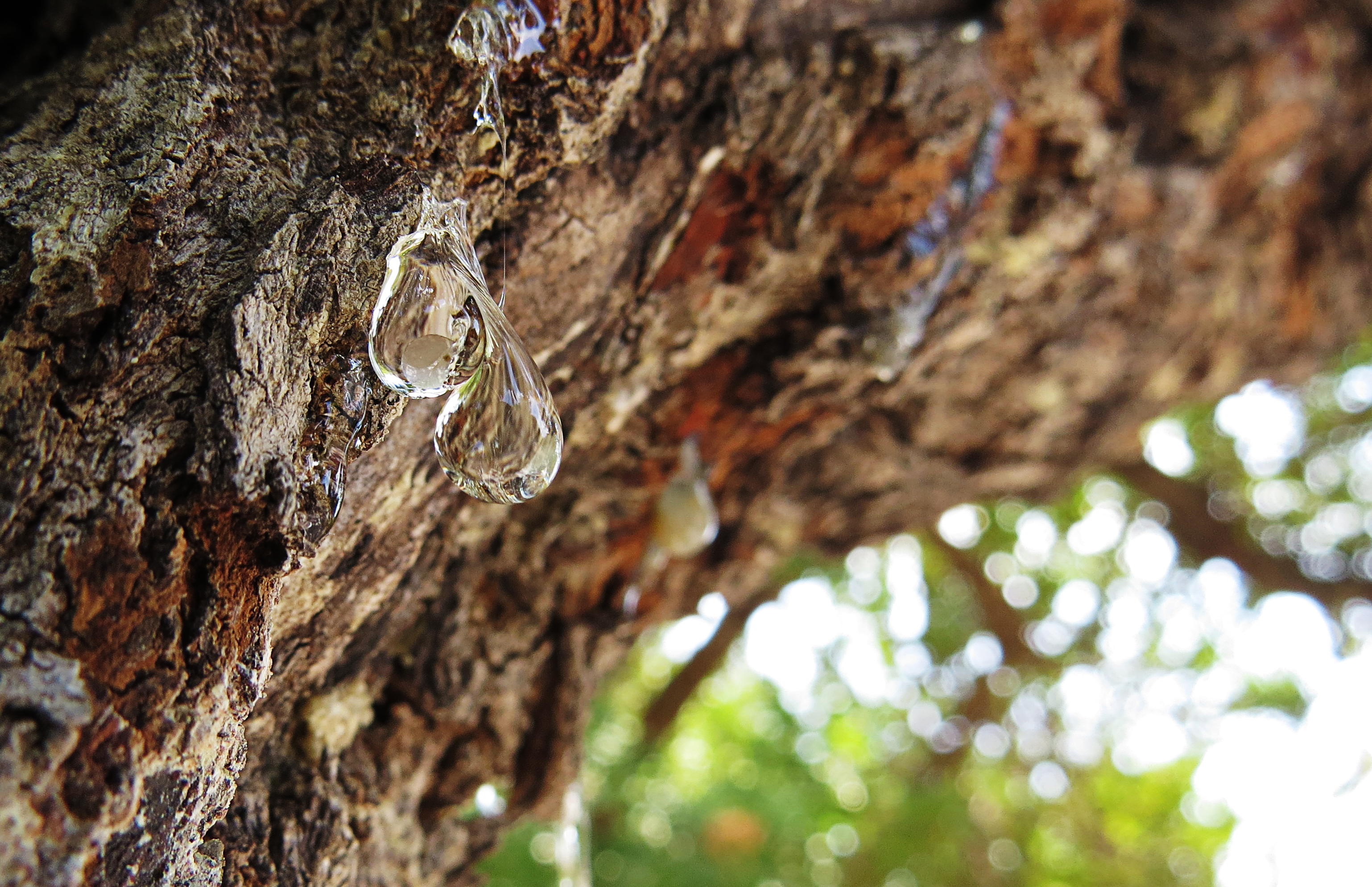 Slzy mastichy stekajúce zo stromu Pistacius Lentiscus.